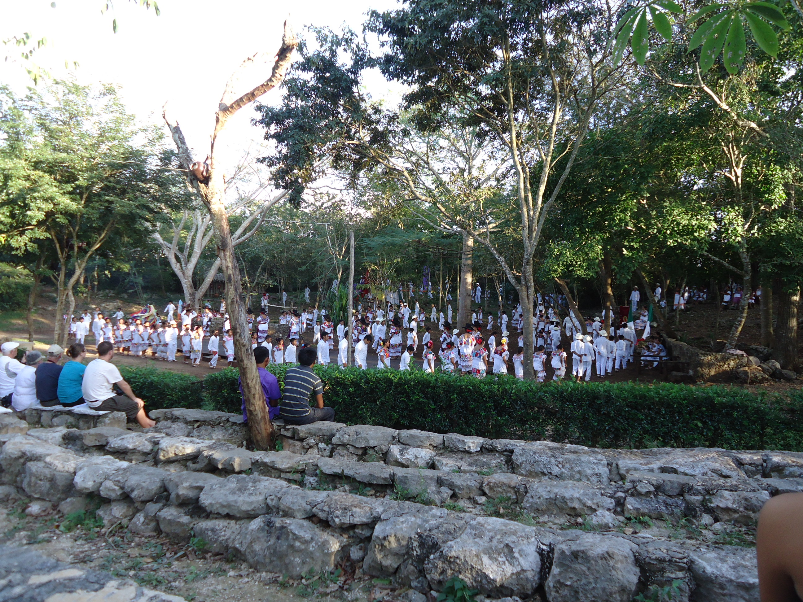 Teatro Xocén